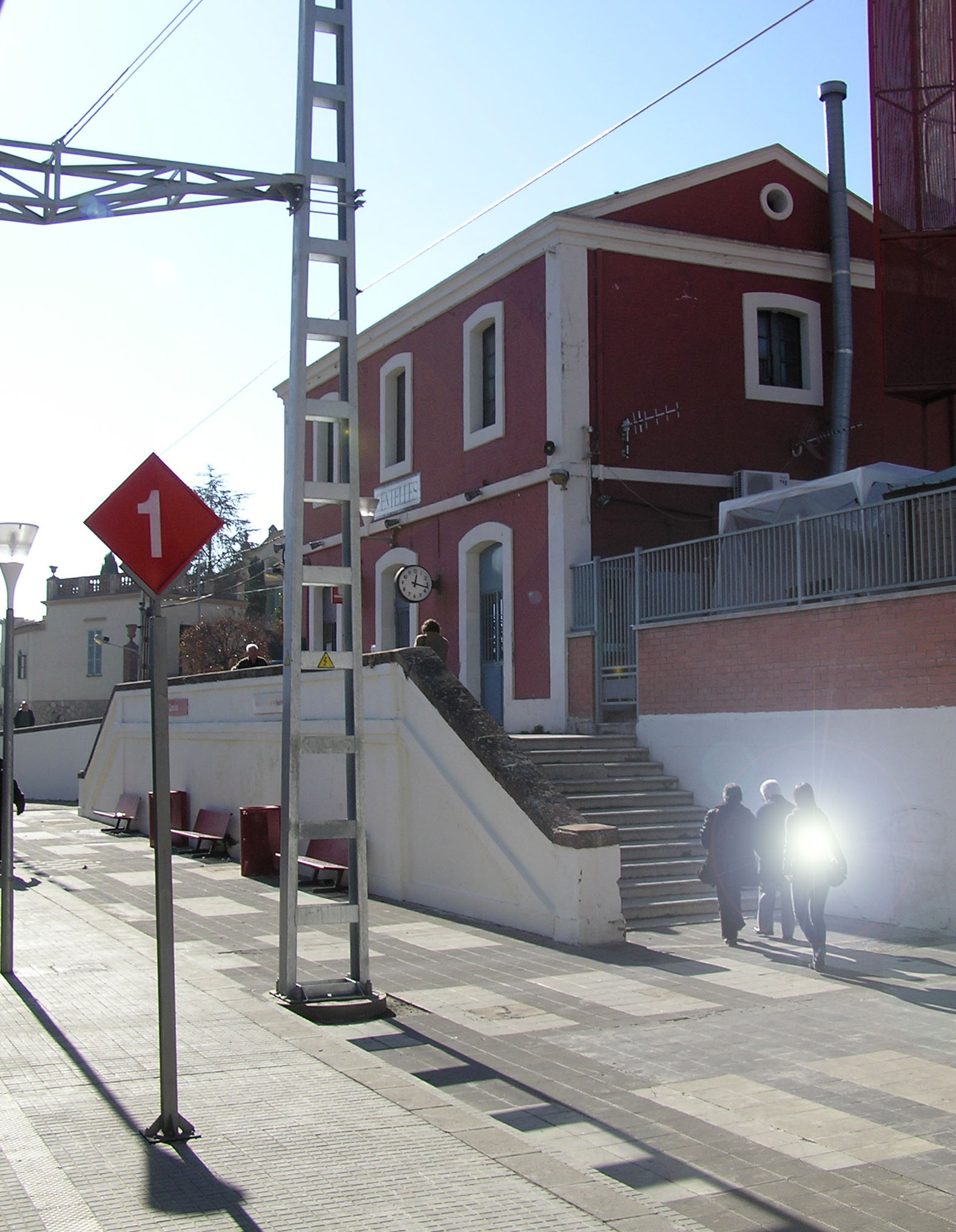 Fotografía de la estación de RENFE de Centelles en enero de 2008